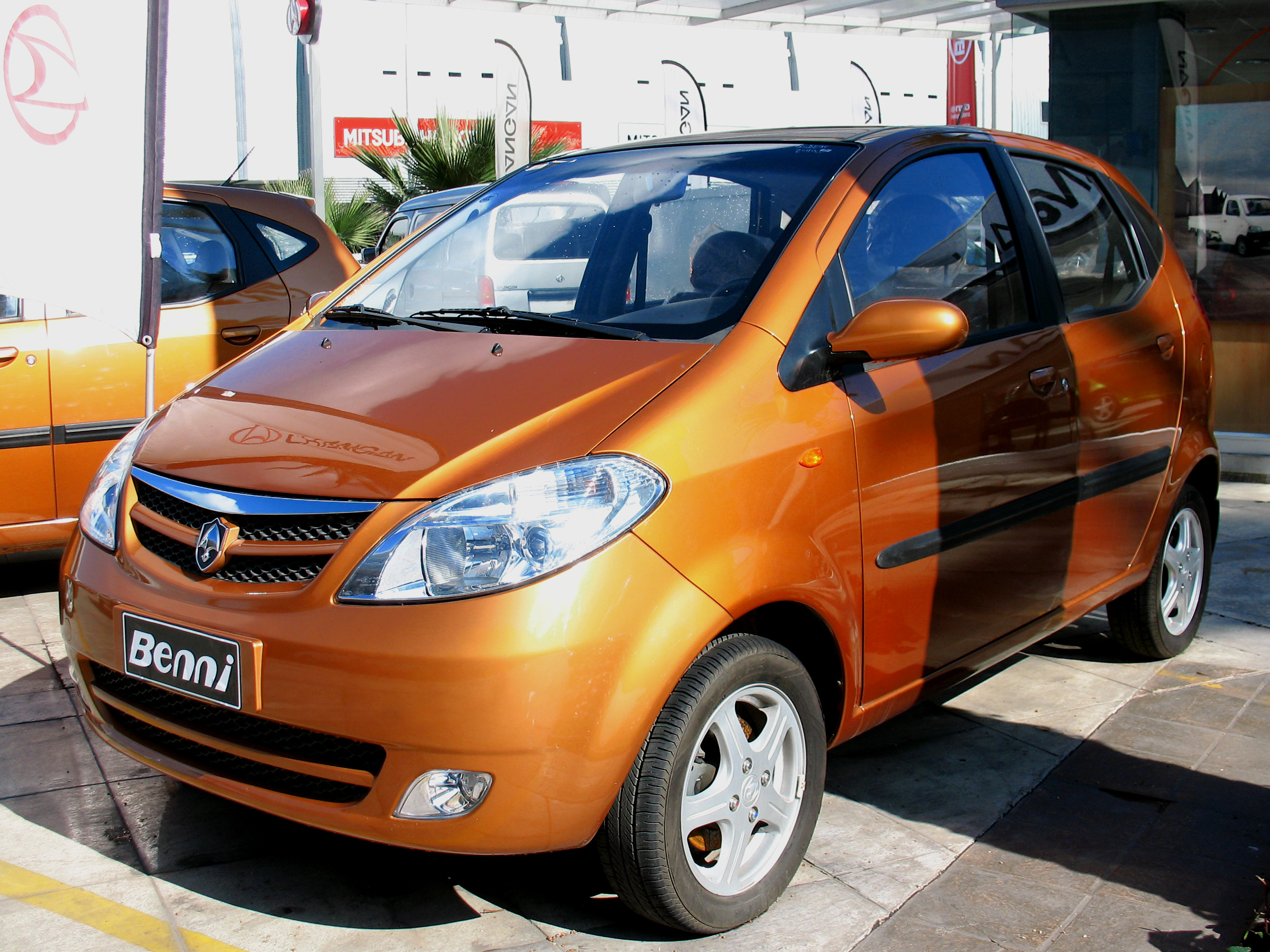 Changan Benni 1.3 2009